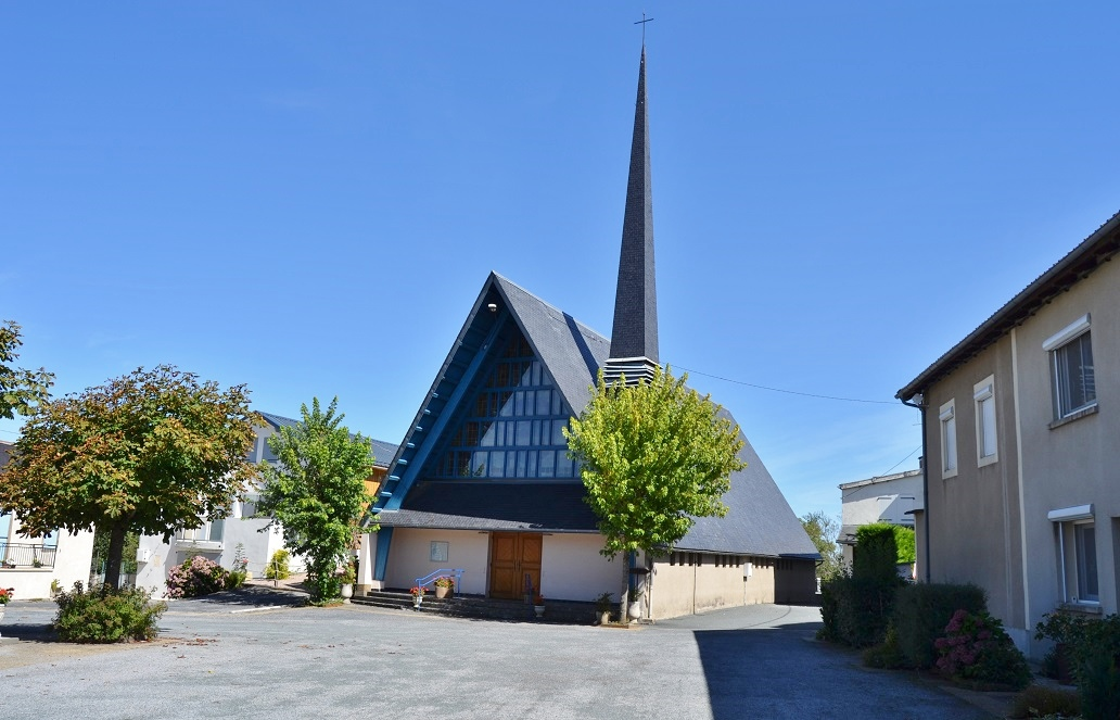 église de L'assomption